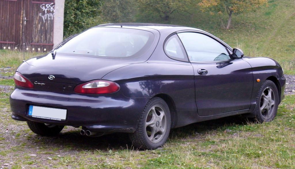 Hyundai Coupé